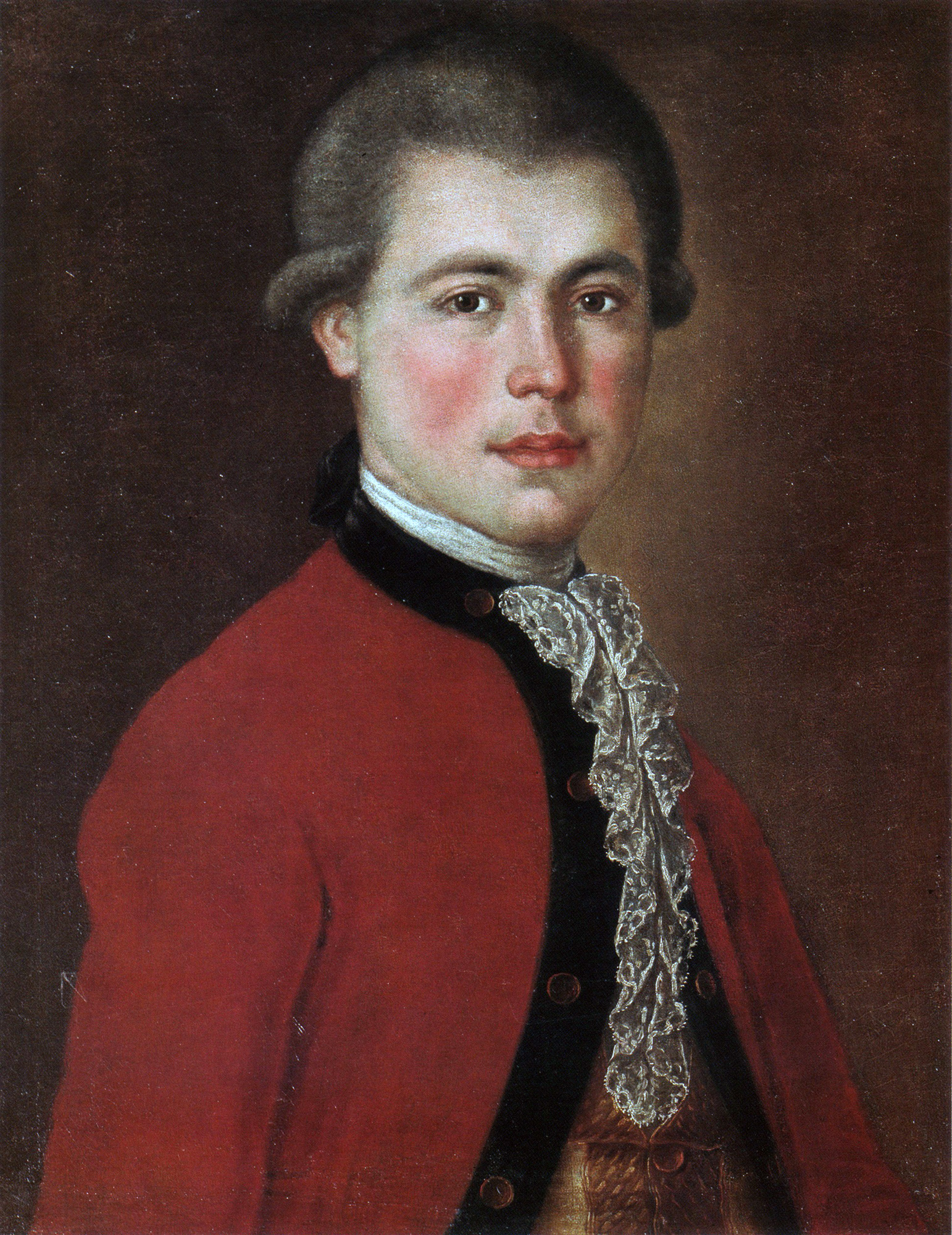 Алексей Иванович Корсаков (1751-1821)